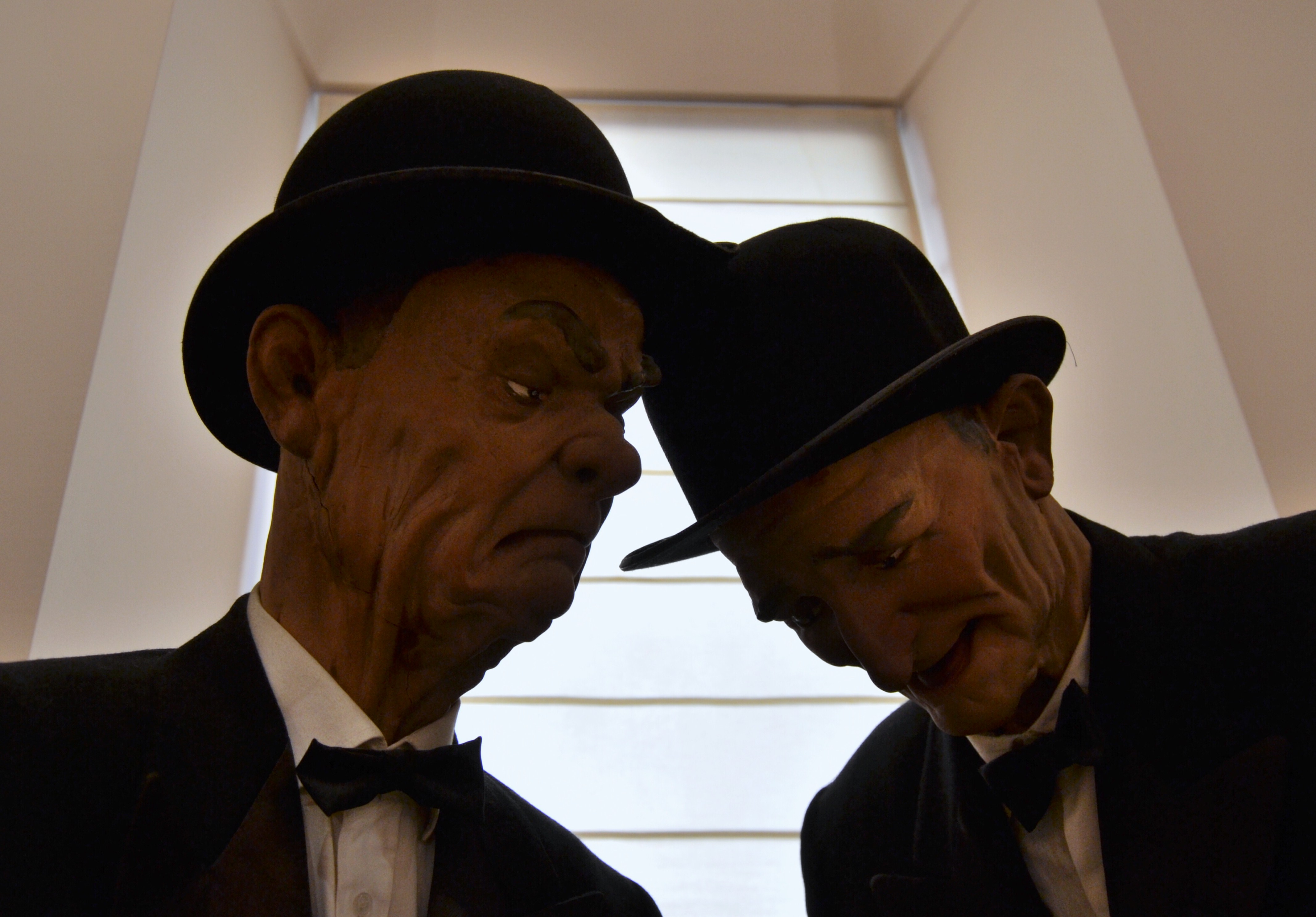 Dos germanetes dels pobres, Regí Mas Marí, falles de 1944. Falla de la plaça del Mercat. Categoria especial, primer premi. Dimensions: 152 cm x 99 cm x 90 cm. Restaurada per l'artista Vicent Luna el 1995. Tècnica: cera acolorida amb pintura a l'oli. Acabat de pintura a l'oli. Materials: caps de cera i mans de polièster. Estructura de fusta i cartró, vestits de tela. Museu Faller de València.